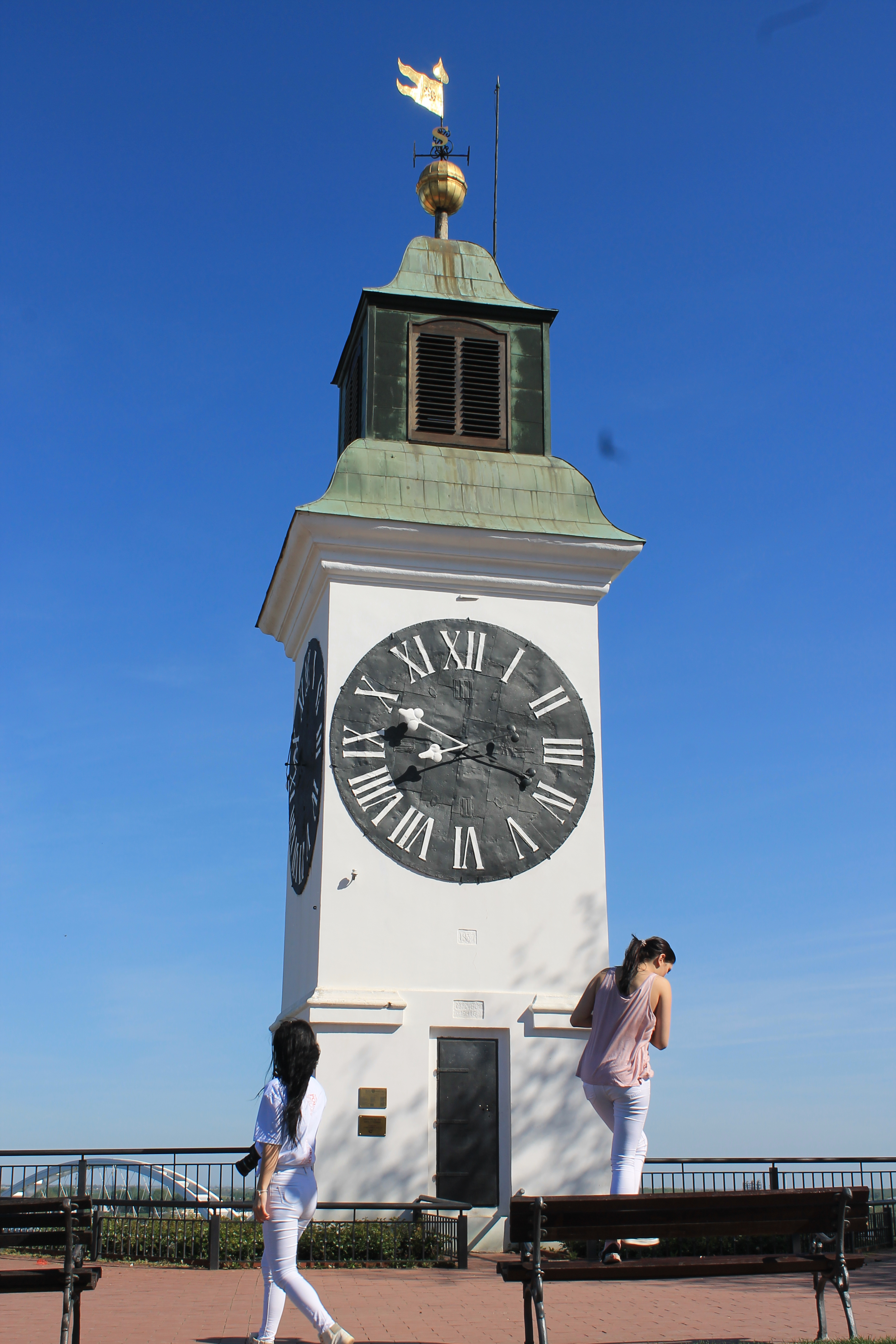 Petrovaradinska tvrđava